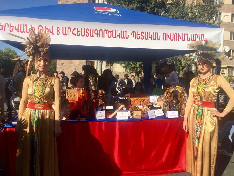 Ուսումնարանի ուսանողները Էրեբունի Երևան տոնակատարությանը 2017